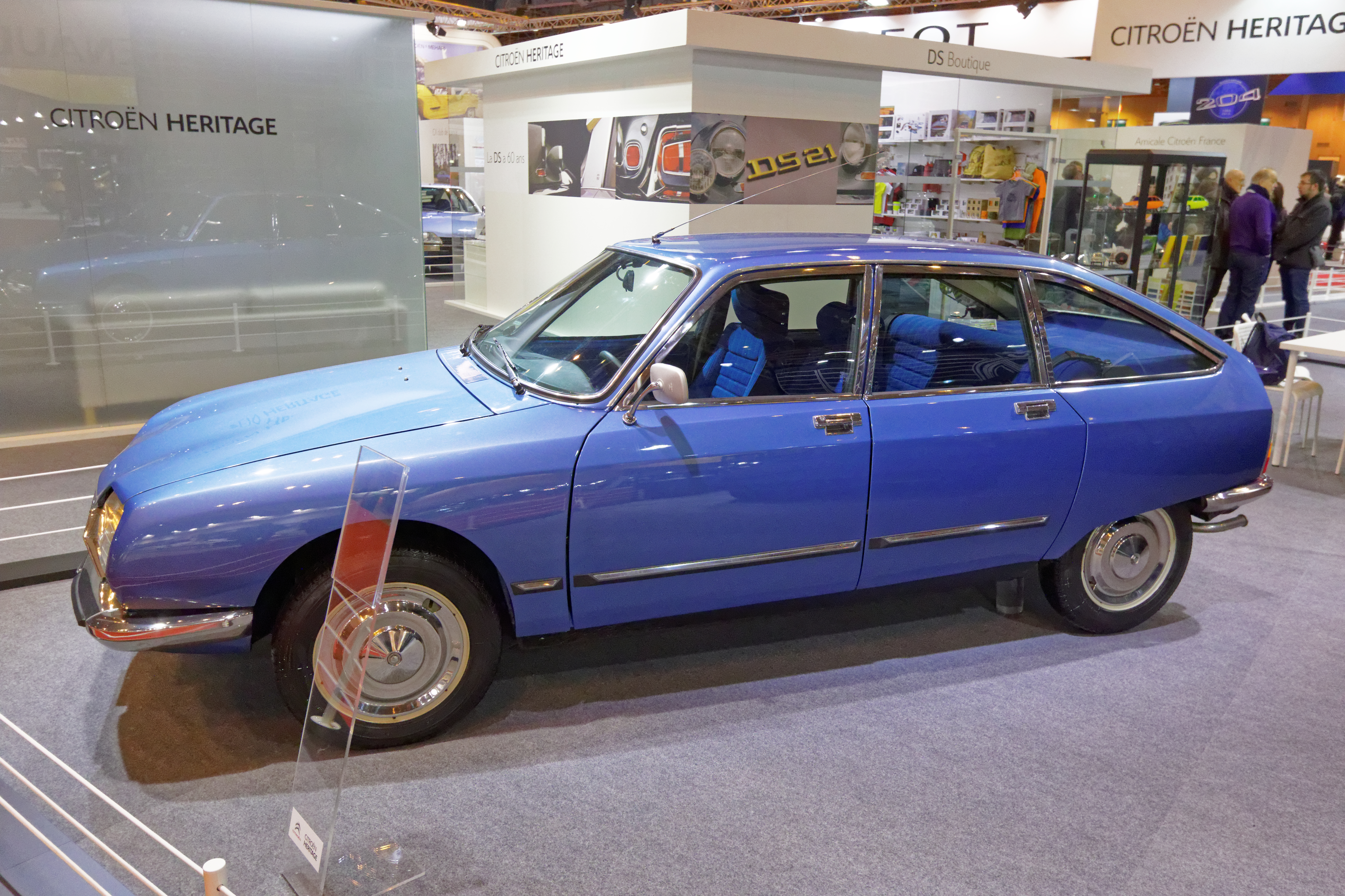 Une des voiture présentée lors du salon Rétromobile de Paris 2015